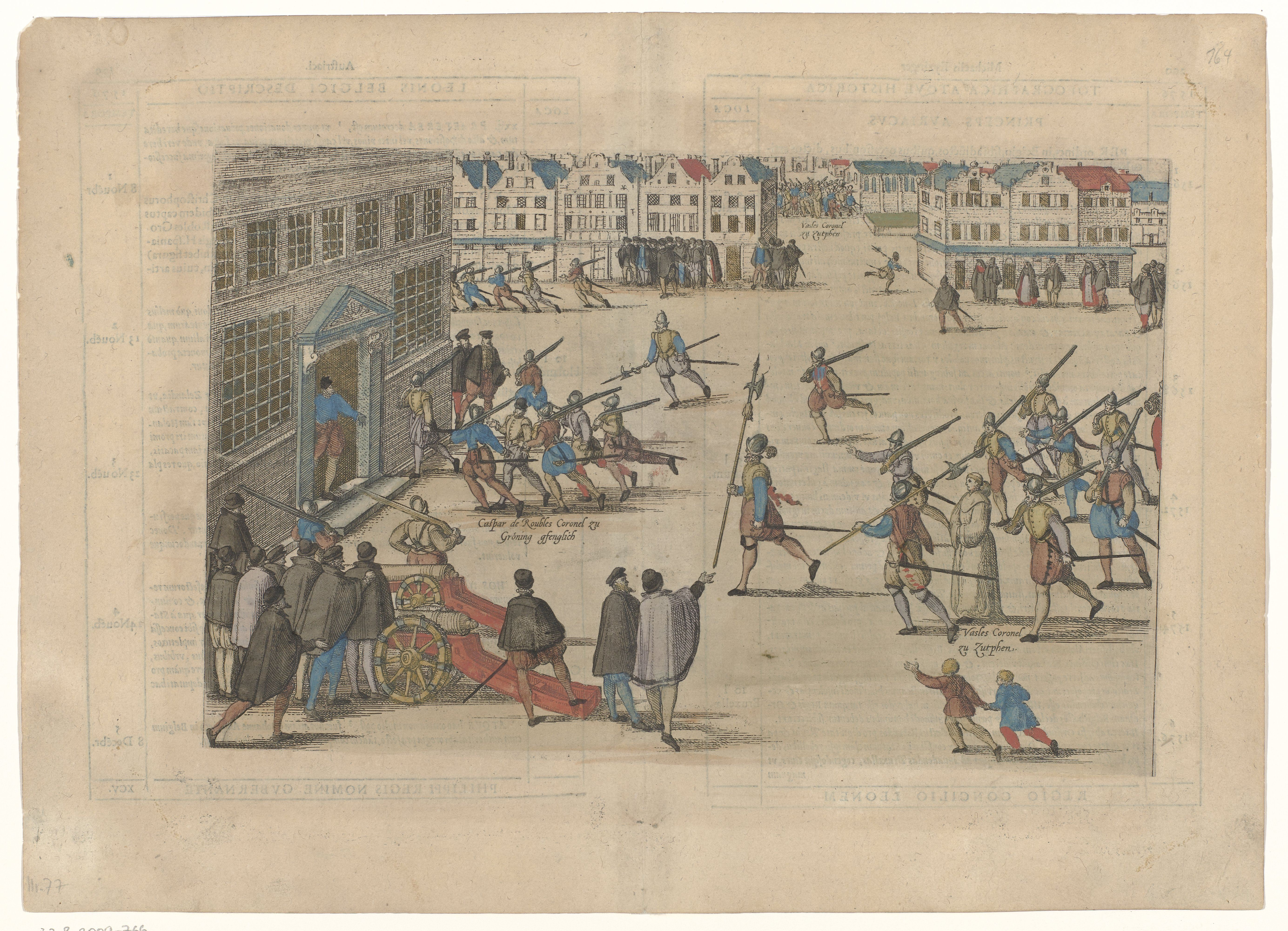 Prent uit serie 7: Nederlandse geschiedenis 1576-1577. Arrestatie van de Spaanse stadhouder Caspar de Robles in Groningen, 23-25 november 1576 (links). Arrestatie van een monnik Vasles uit Zutphen (rechts).